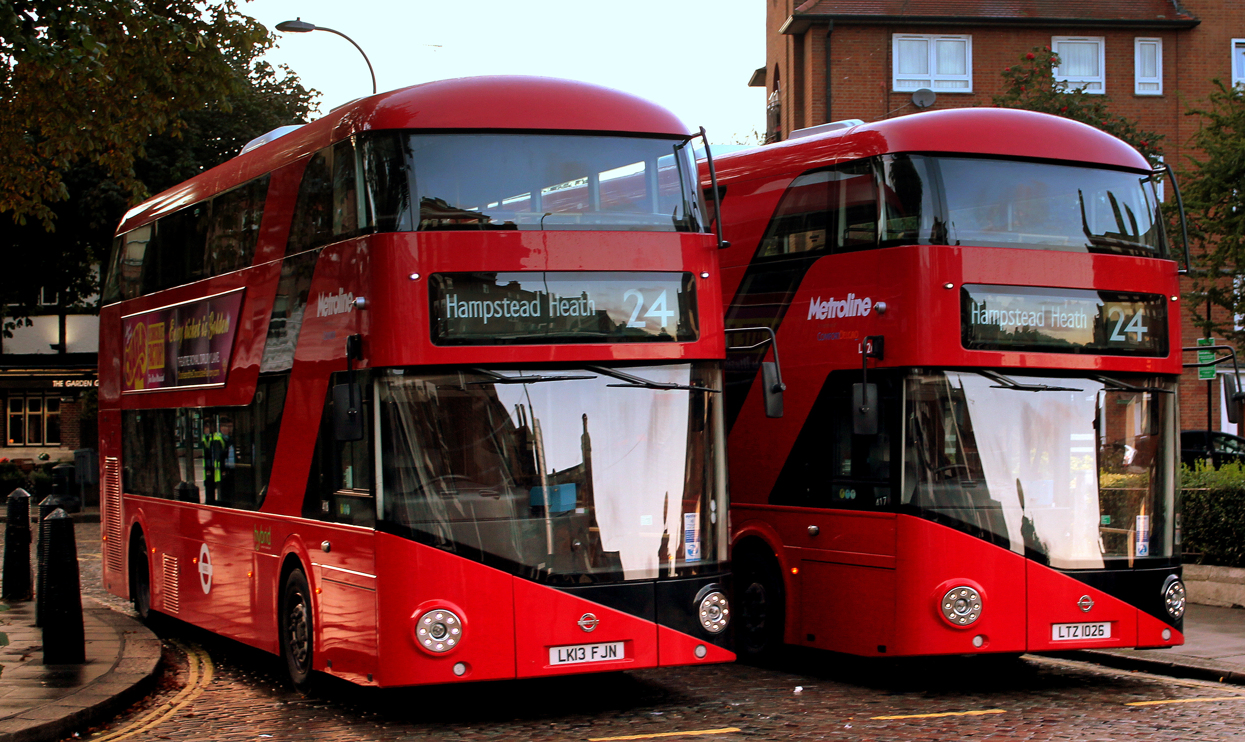 TRANSPORT FOR LONDON METRO LINE WRIGHTBUS LT CLASS BUSES THE SO CALLED BORISMASTERS AT HAMSTEAD HEATH BUS STATION LONDON SEP 2013